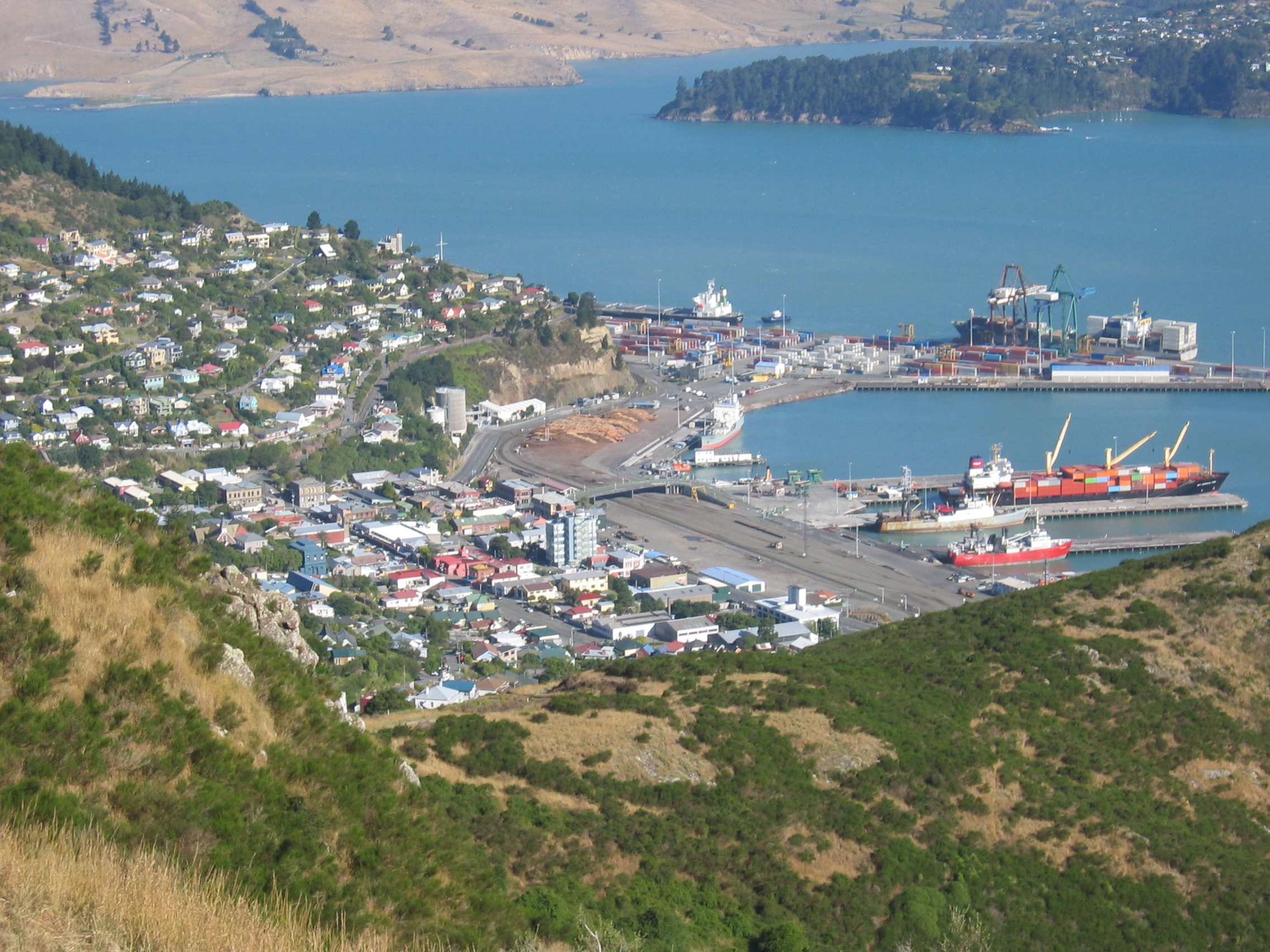 紐西蘭利特爾頓.